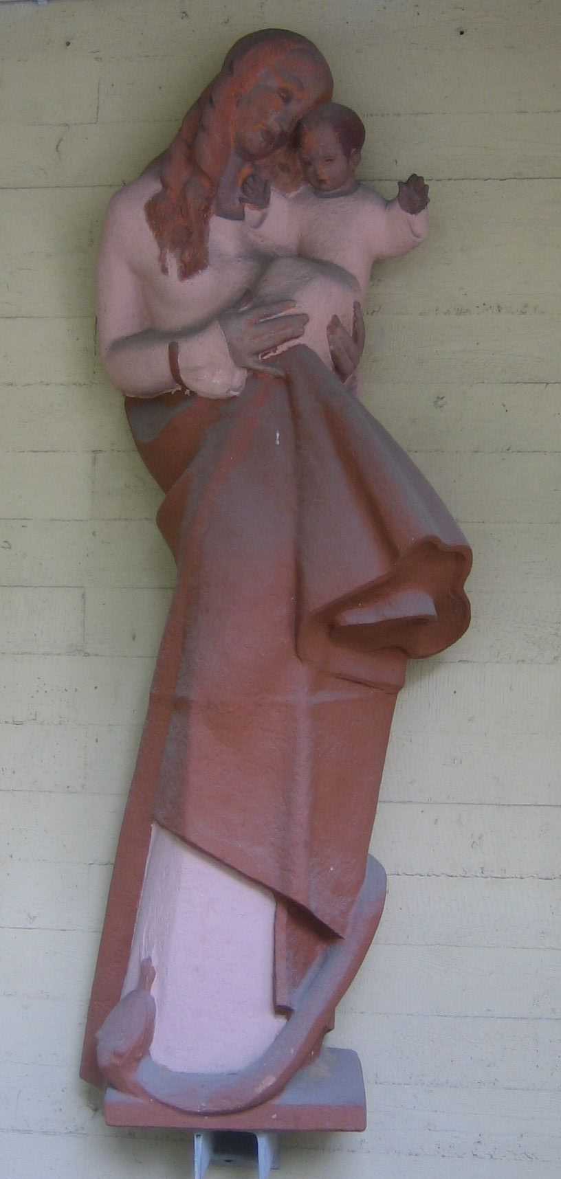 Die von Bildhauer und Keramikforscher Adam Winter gestaltete Marienplastik der Liebfrauenkirche, Mainz. Die Plastik ist über dem Abgang zur Krypta angebracht